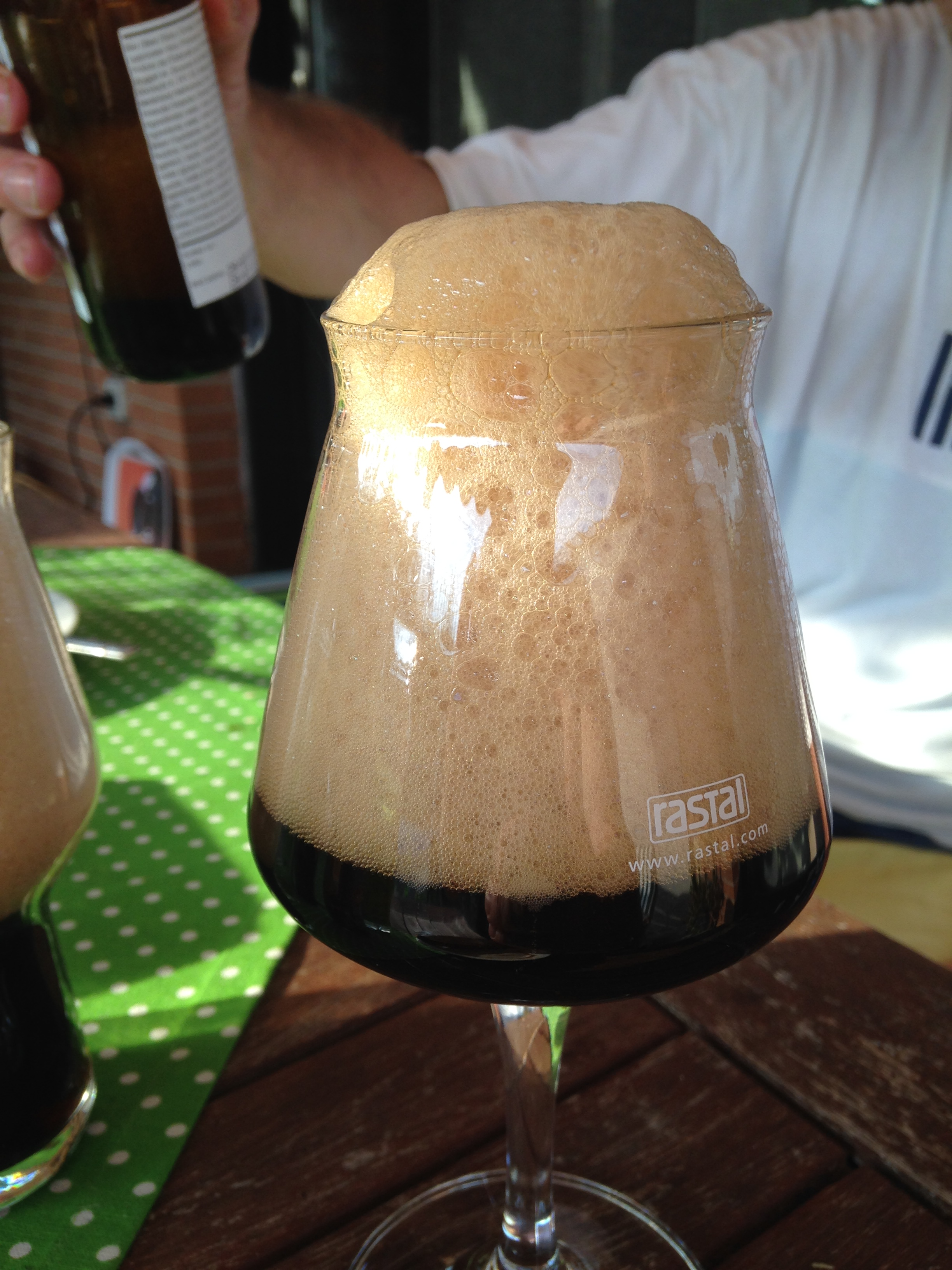 Extrem karbonisiertes Bier der De Molen Brauerei